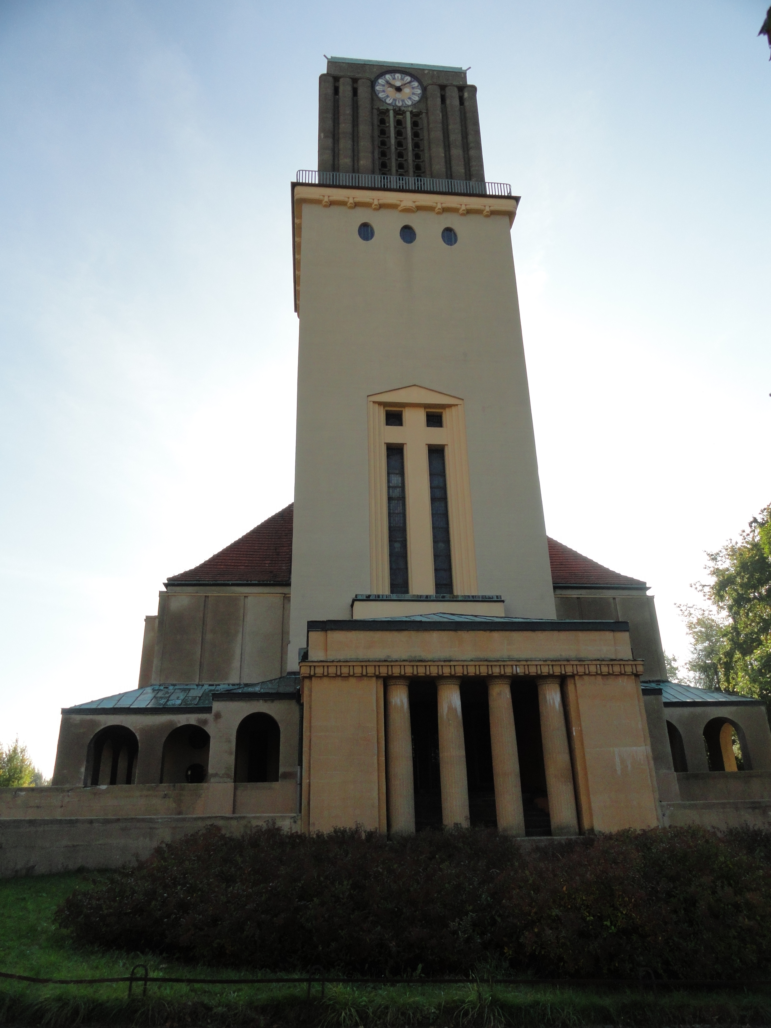 evang. Kreuzkirche in der Görlitzer Südstadt